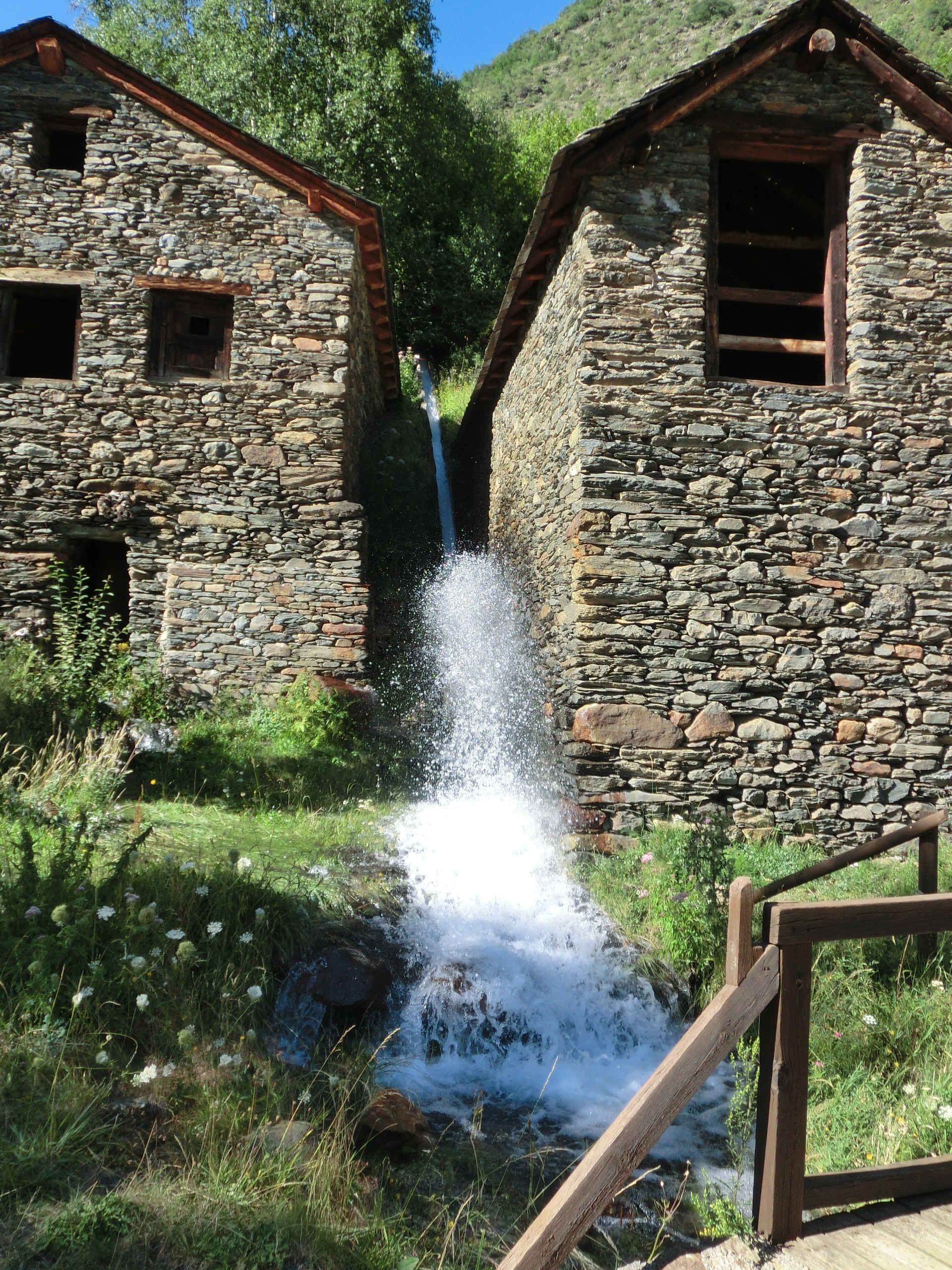 Serradora d'Àreu (Vall Ferrera, Alins, Pallars Sobirà, Catalunya)